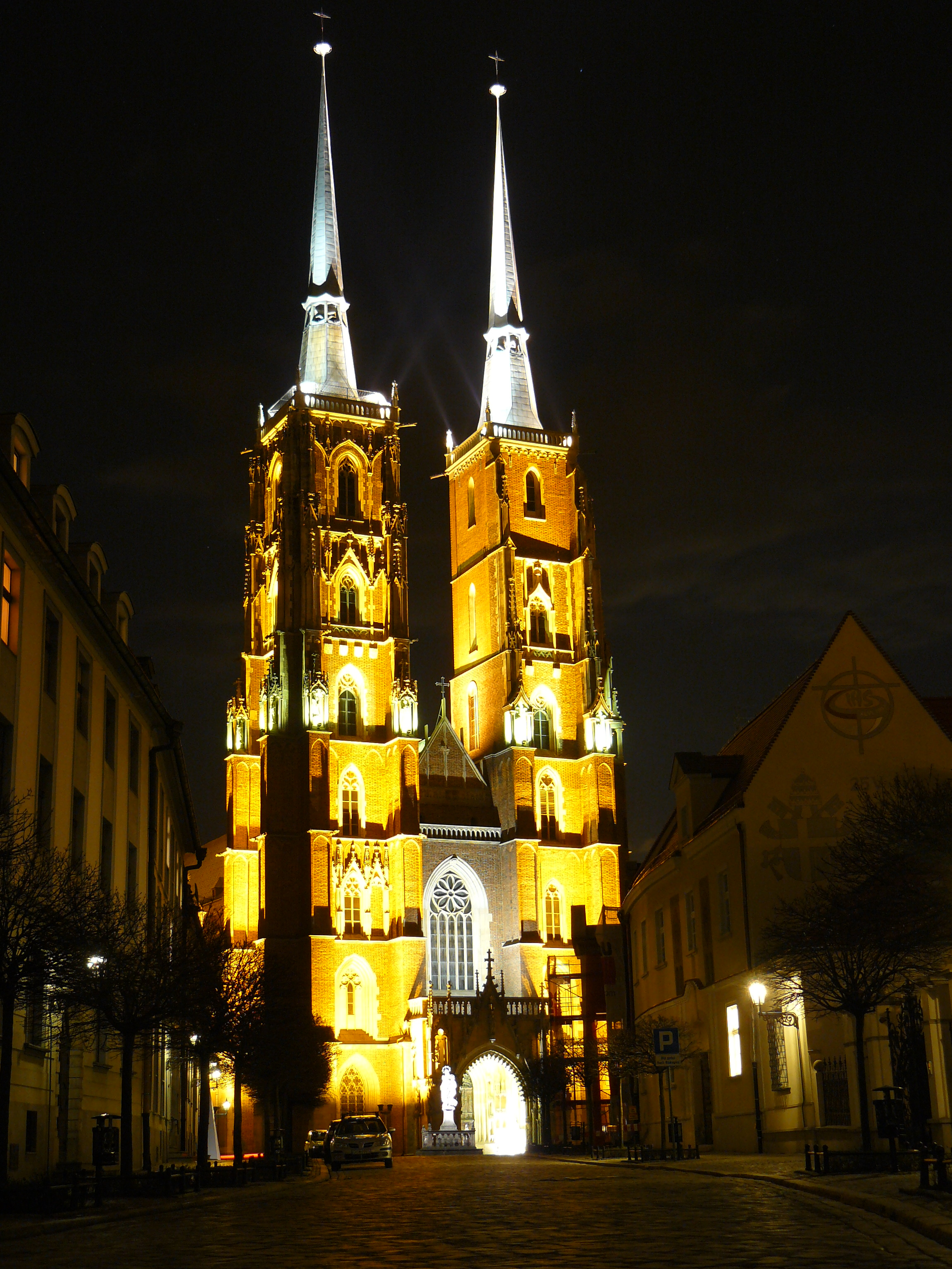 Wrocław - Ostrów Tumski, Katedra.